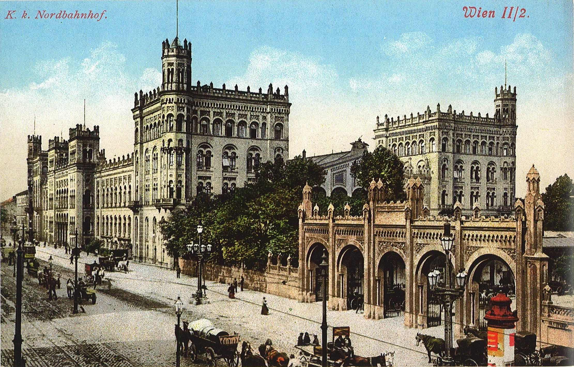 Der Nordbahnhof, Ansichtskarte.